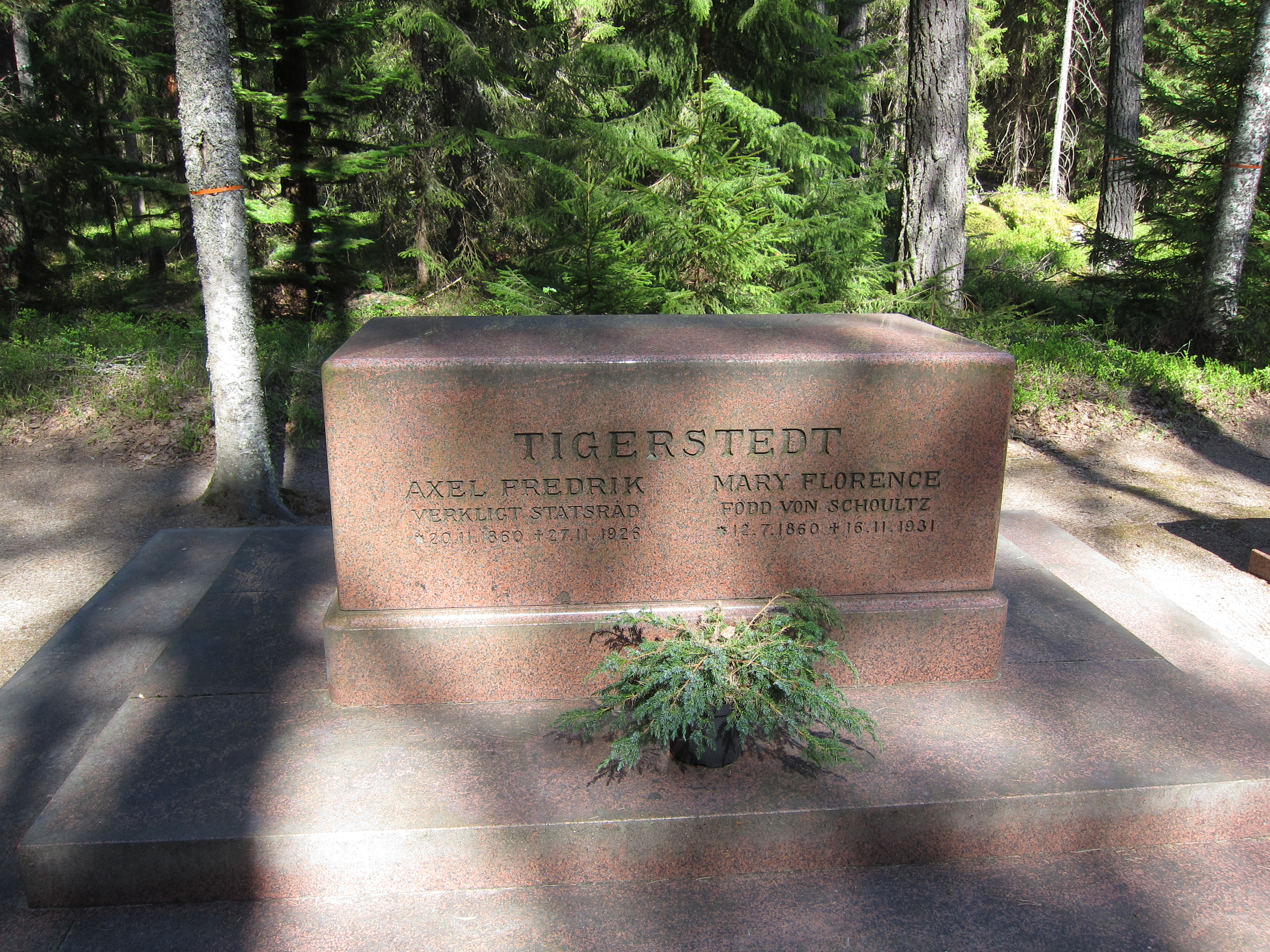 Axel Fredrik Tigerstedtin hautakivi Mustilan arboretumissa Kouvolassa Suomessa.